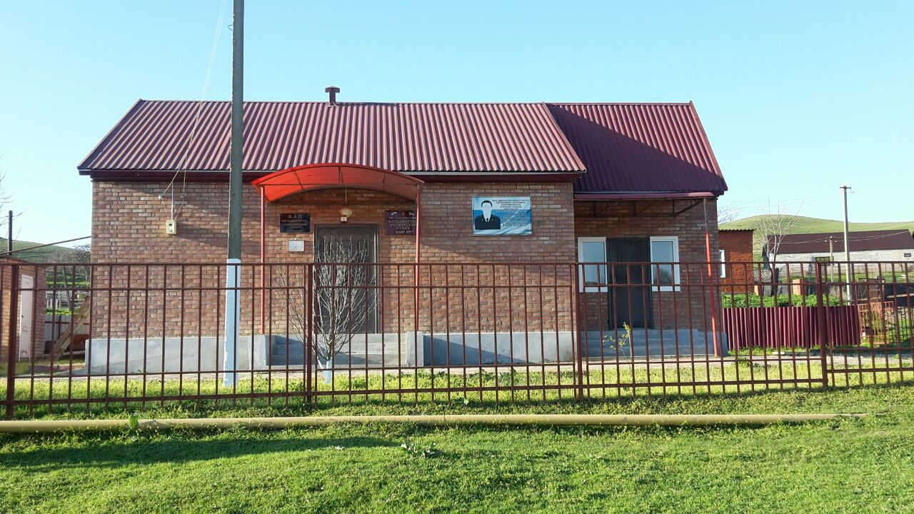 Нохчийн: Дарбанийн пункт